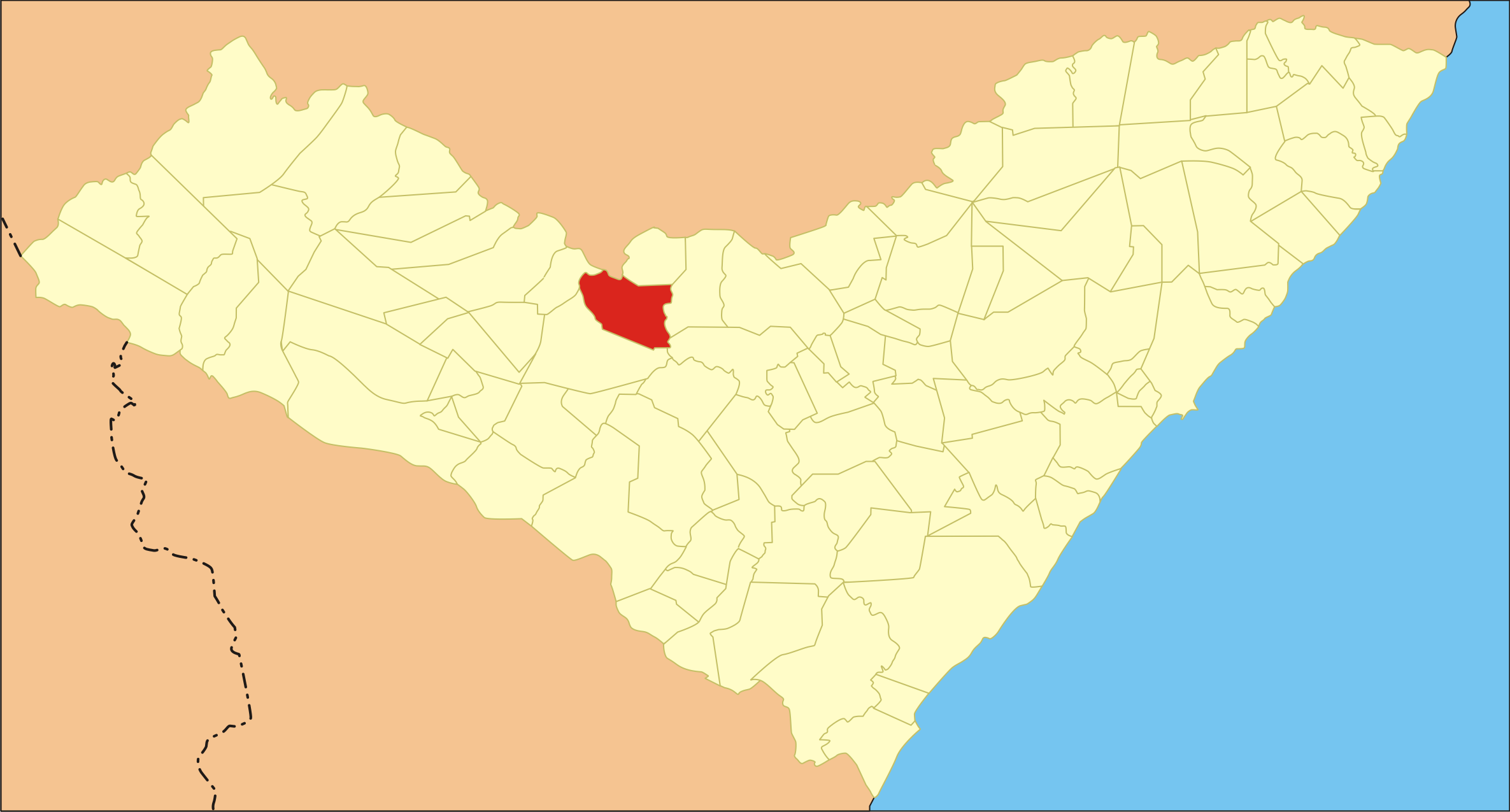 Localização da cidade no estado de Alagoas.